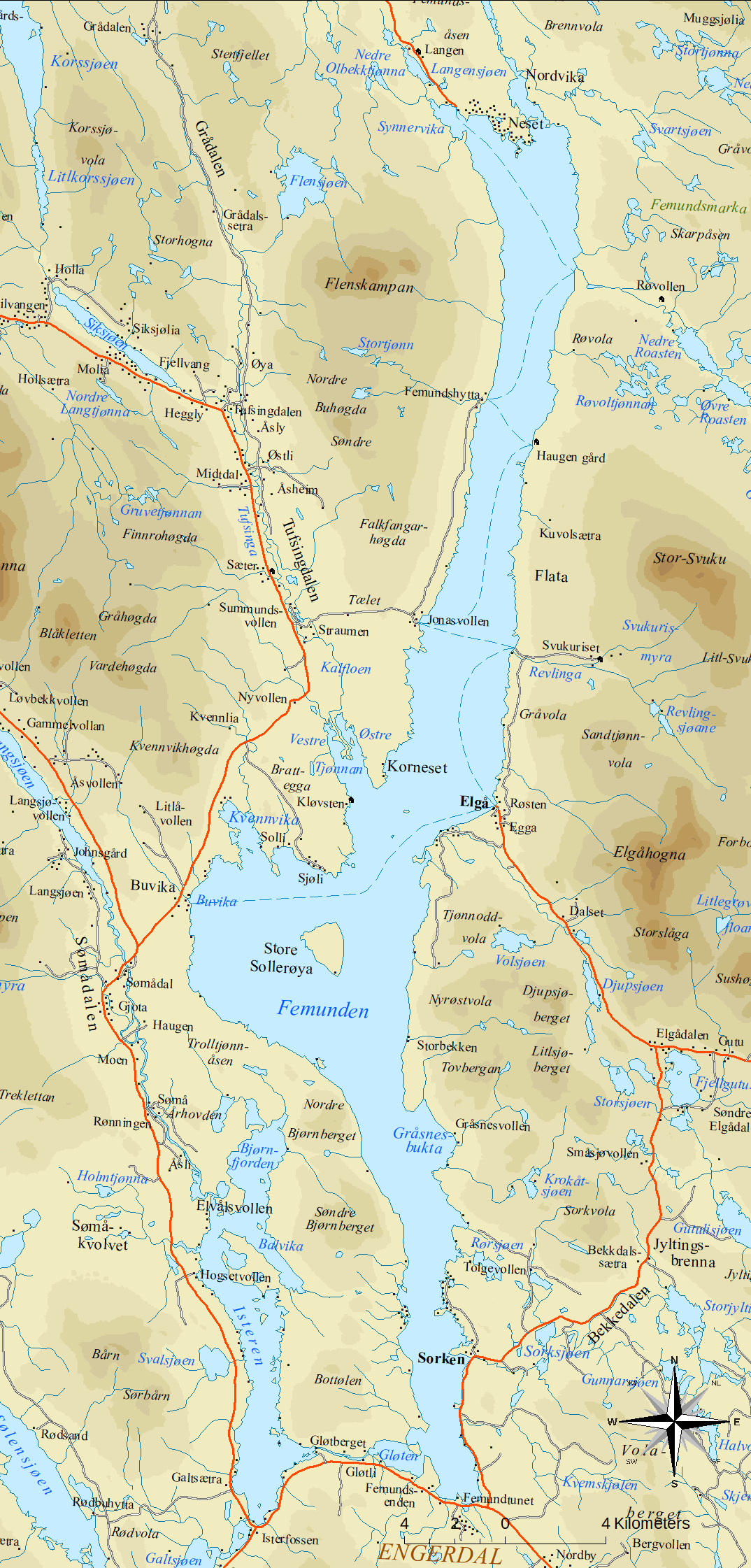 Karta över Femunden i Norge